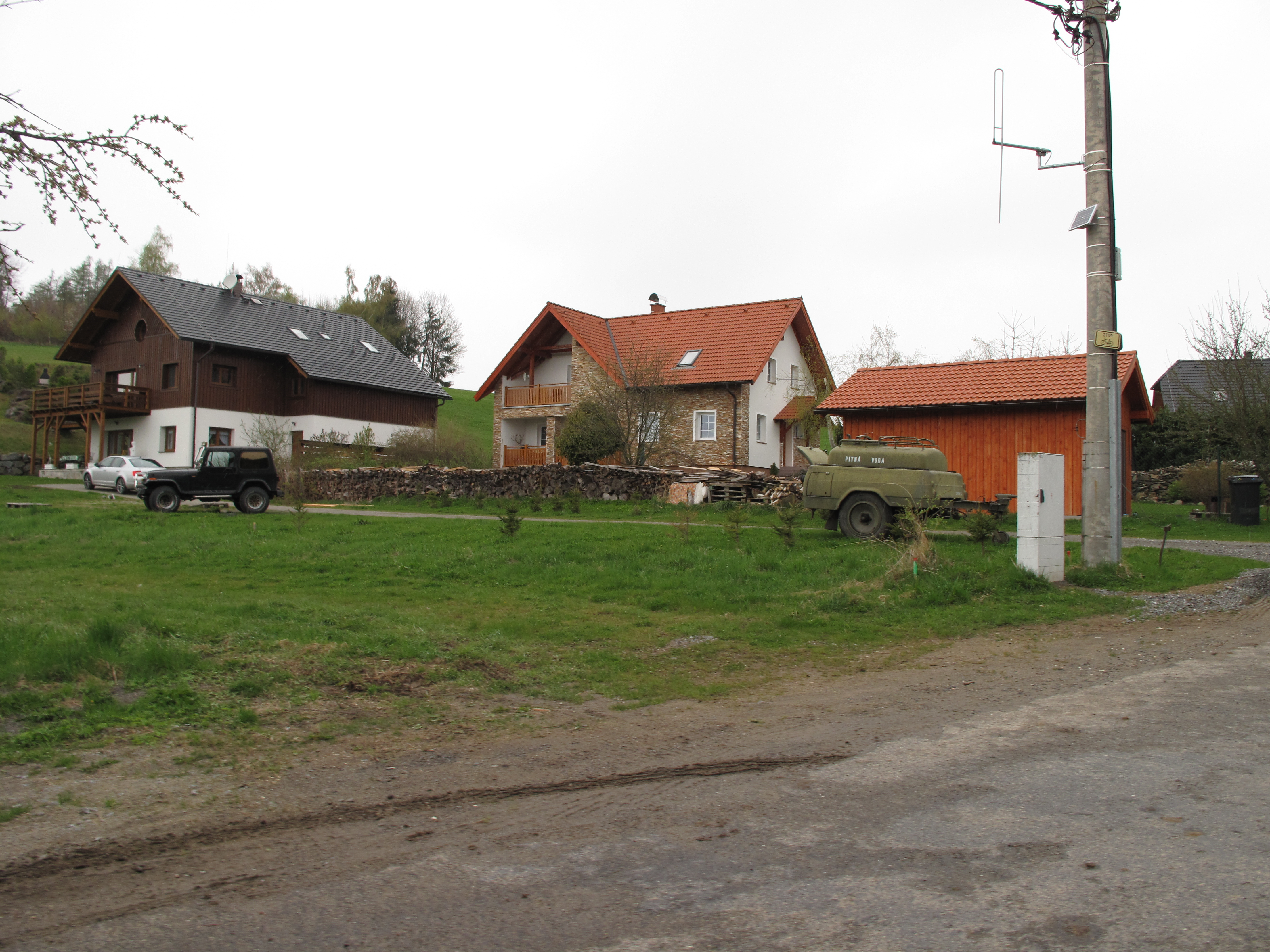 Libětice (Hlavňovice). Okres Klatovy, Česká republika.